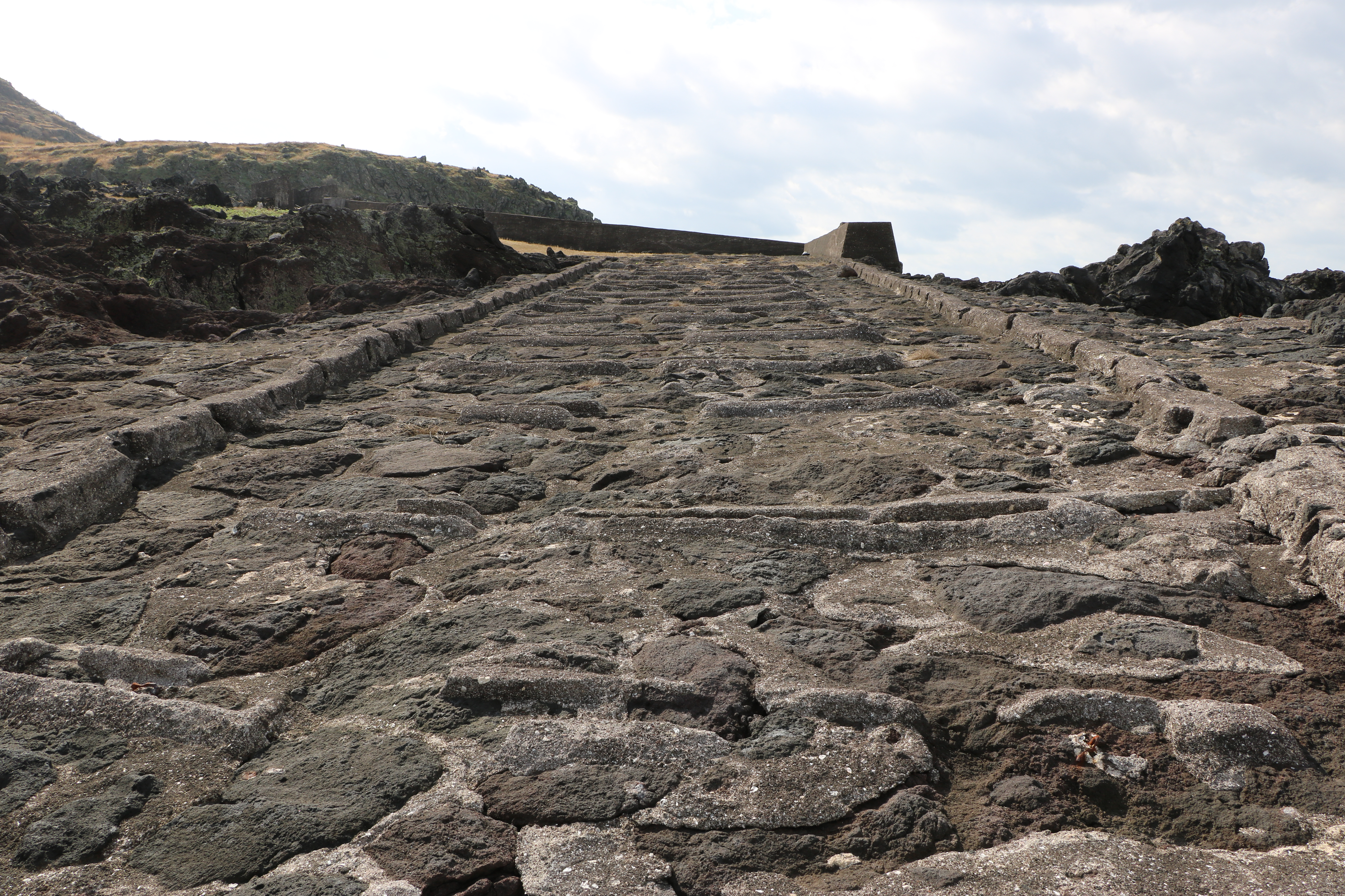 八丈小島鳥打地区の船着き場上部の道（東京都八丈町）